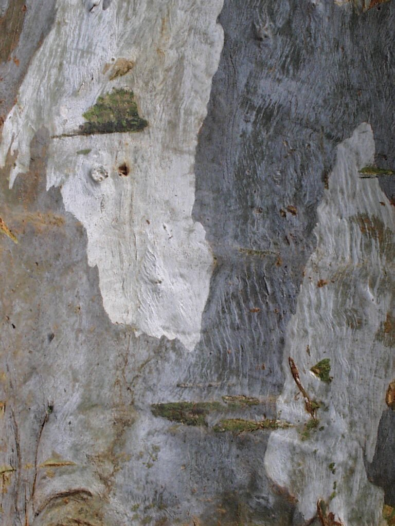 ecorce gommier rouge